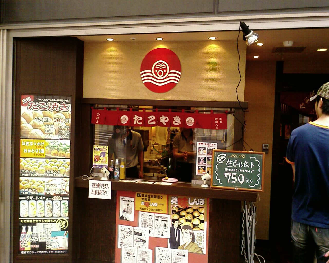 たこ焼き屋「会津屋」（大阪市北区梅田、大阪駅桜橋出口最寄りの「たこ焼きの元祖 本家 会津屋」[1]梅田店）takoyaki in osaka